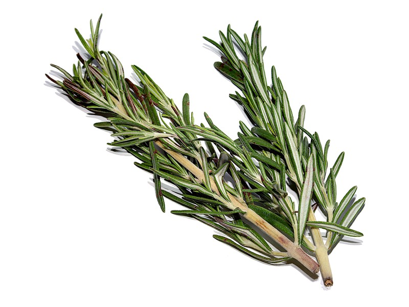 Rosmarinzweige / Rosemary twigs